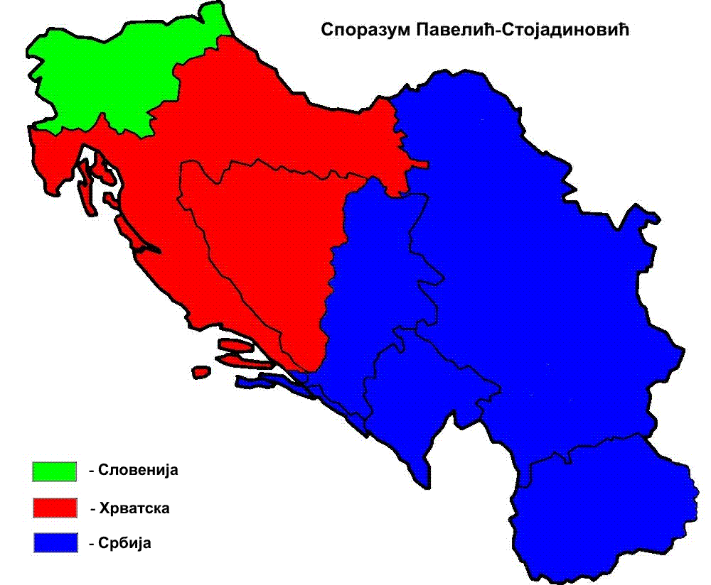 Карта Споразума Павелић-Стојадиновић са приказом граница југословенских република.